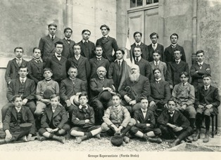 Classe d'Espéranto d’Émile Bord à Beaune (21) Stelo verda